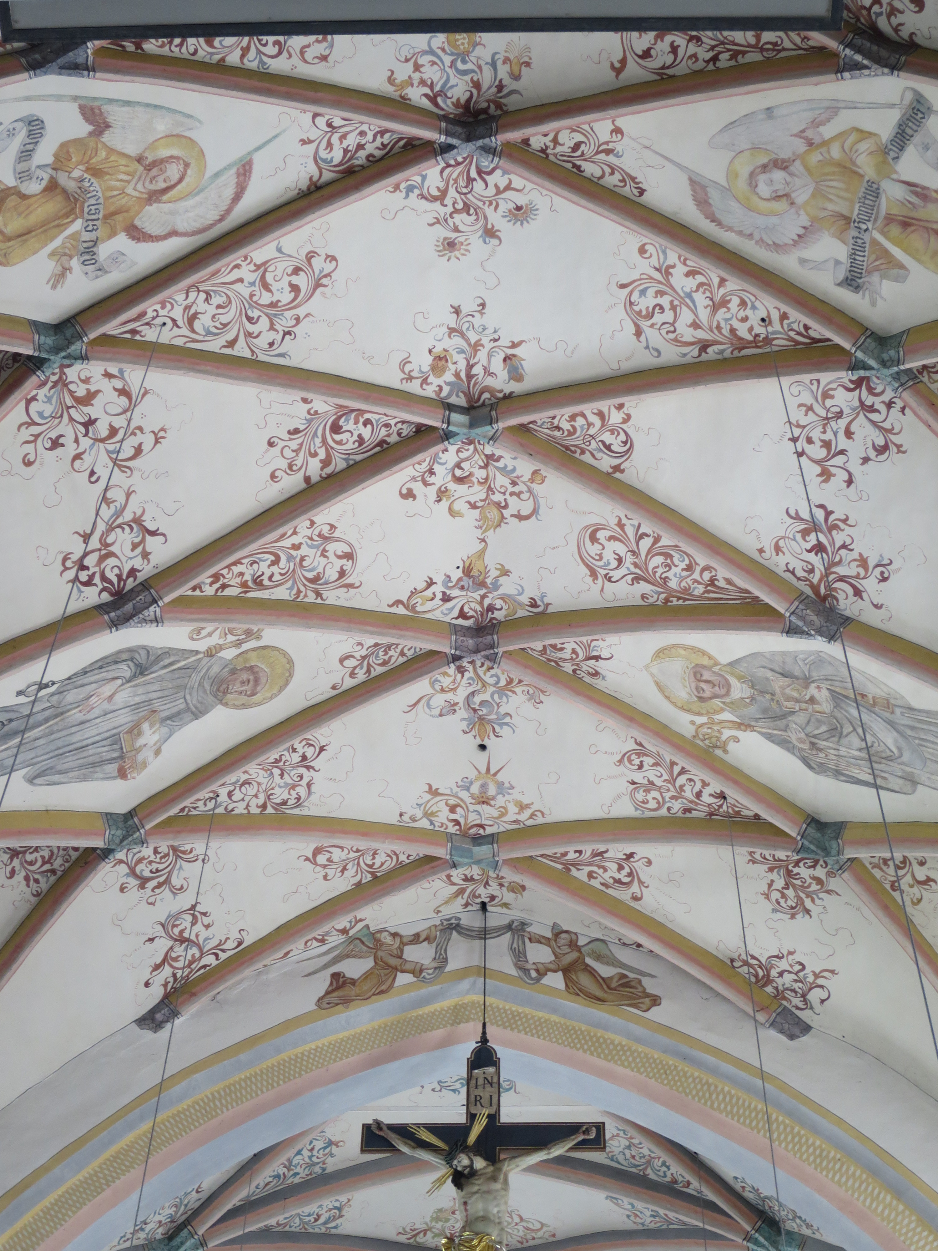 Spätgotisches Bauwerk mit barocker und neubarocker Ausstattung,Decke